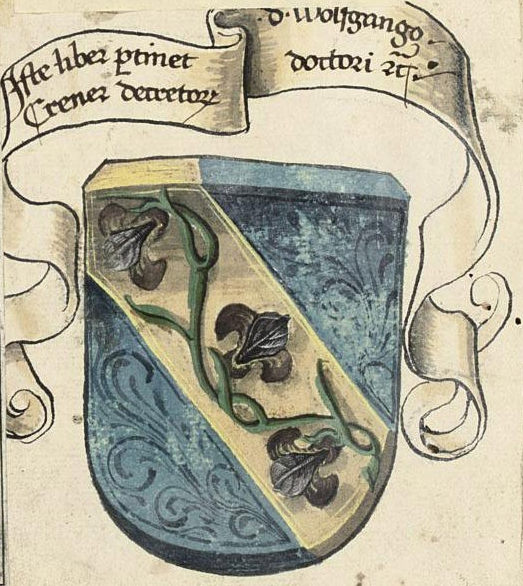 Gemaltes Buchzeichen des Dr. decretorum Wolfgang Crener [zu Hall in Tirol], später Waldauf-Bibliothek